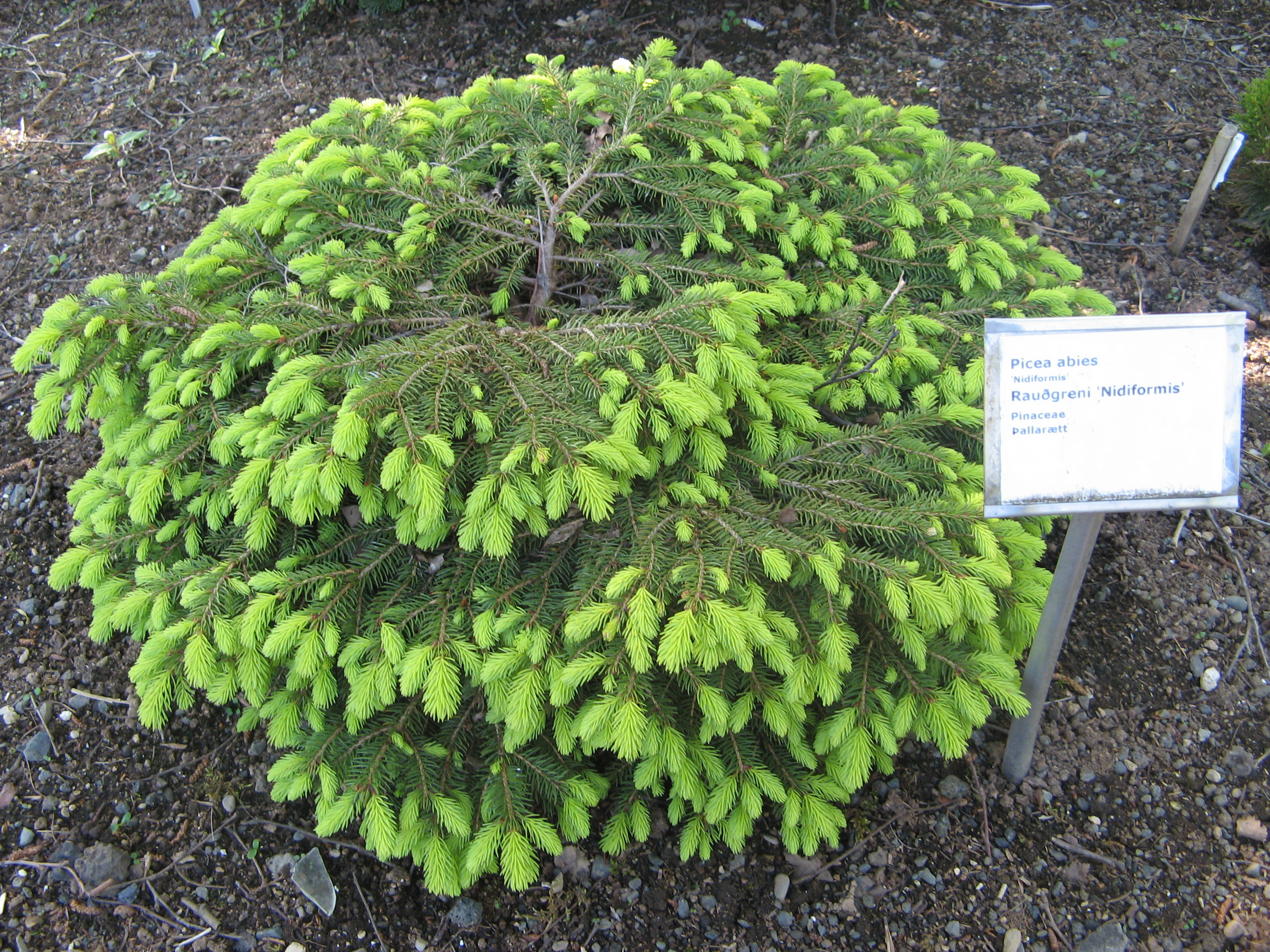 Un épicéa commun très petit, jardin botanique de Reykjavik